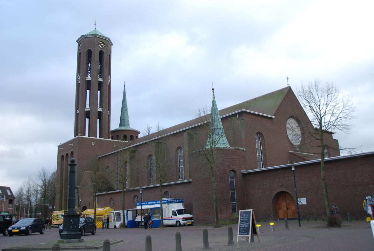 Limburgs: Haors (Horst) Kèrk van Alphons Boosten